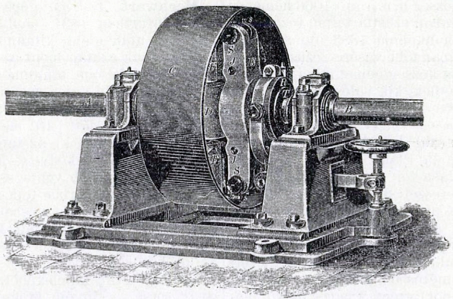 Mechwart-féle tengyelykapcsoló